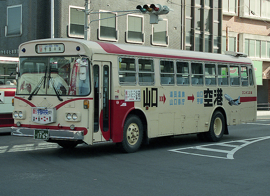 サンデン交通 山口－山口宇部空港－宇部中央線 日産ディーゼル K-UA31K 西工53MC B型